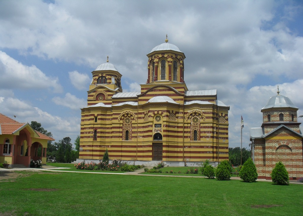 Храм СПЦ Св. апостола Петра и Павла, Глушци, Мачва, Србија